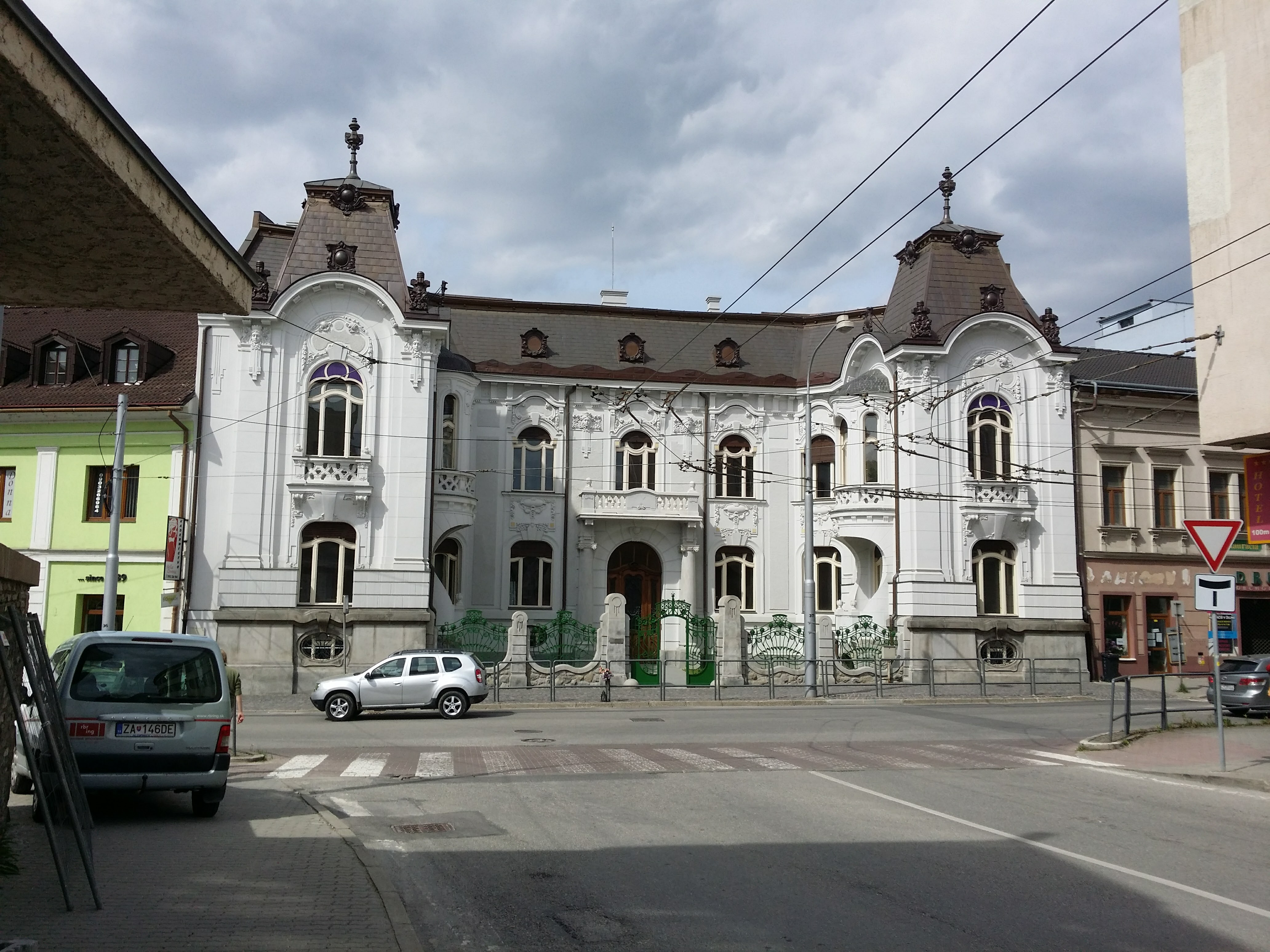 Žilina, Rosenfeldov palac, Hurbanova ul. 28 (po rekonštrukcii)